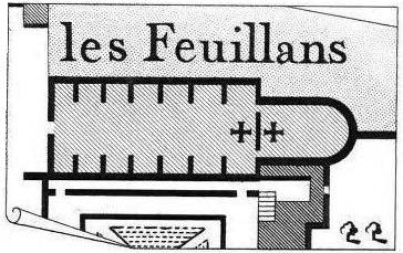 "Plan du couvent des Feuillants du faubourg Saint-Honoré". (détail)